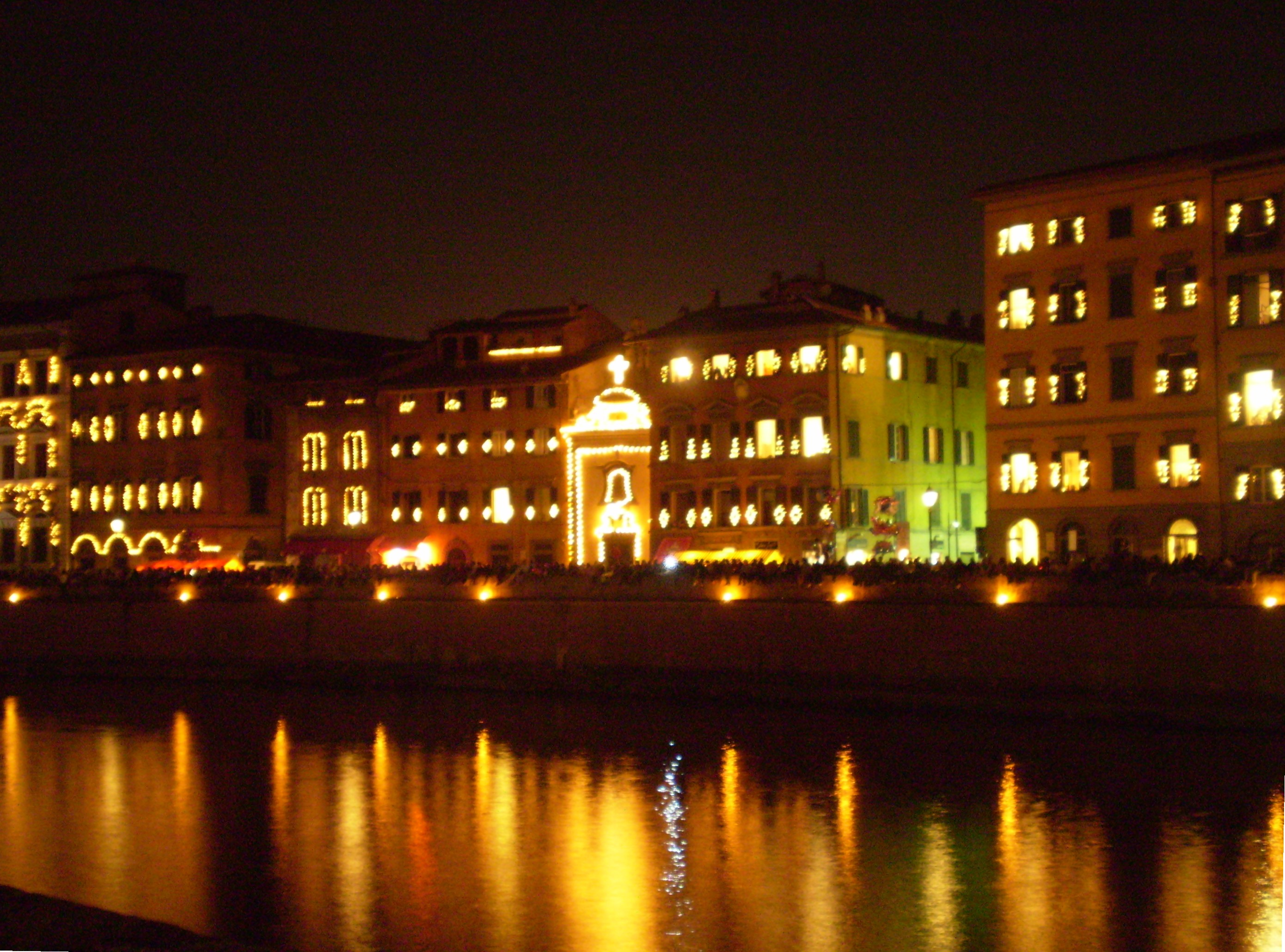 Pisa, Tuscany, Italy. Luminara 2007 - - View from Lungarno Gambacorti to Lungarno Pacinotti